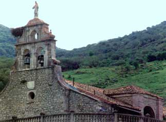 Iglesia San Adriano